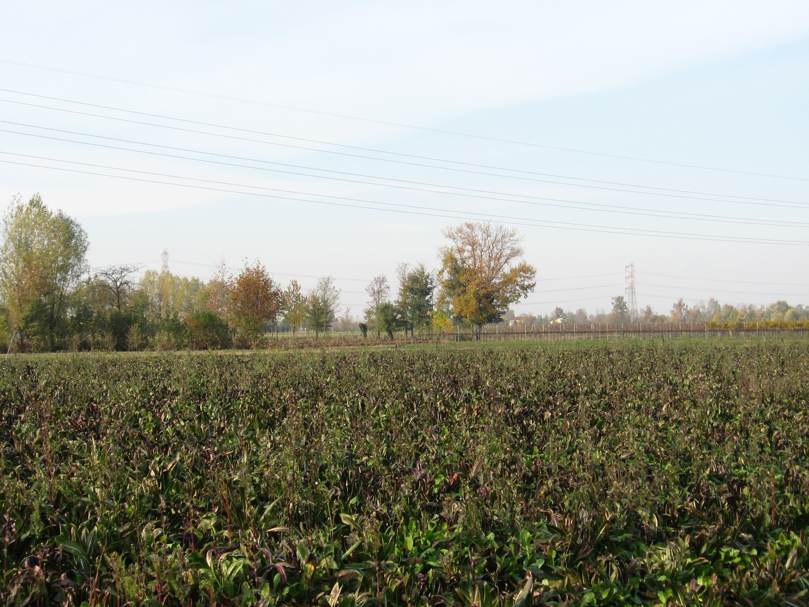 La campagna moglianese in località Le Selve.